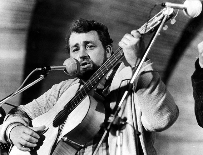 Cornelis 1966, samma år som han släppte den stora framgången Grimascher och telegram.